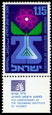 בול כ"ה שנים למכון ויצמן למדע